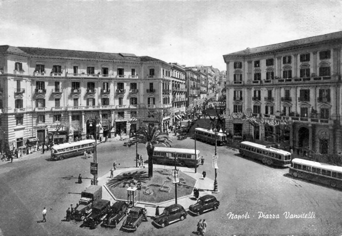 Piazza Vanvitelli in una cartolina illustrata degli anni '50